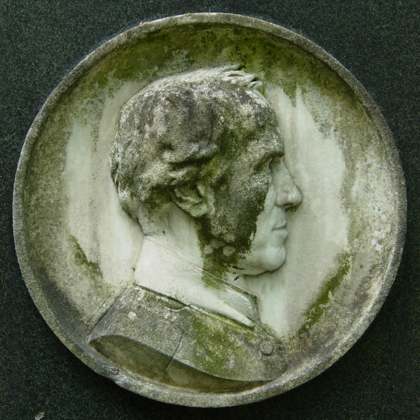 Marmor-Medaillon für den Philosophen und Theologen Franz Peter Knoodt auf dem Alten Friedhof Bonn; das Medaillon hat vermutlich Albert Küppers geschaffen, aber die Urheberschaft ist nicht gesichert, denn die Signatur lässt sich infolge Erosion kaum entziffern (für Küppers sprechen Stil und Qualität sowie seine Nähe zur alt-katholischen Gemeinde, von ihm stammt auch das Bronze-Medaillon für Joseph Hubert Reinkens)